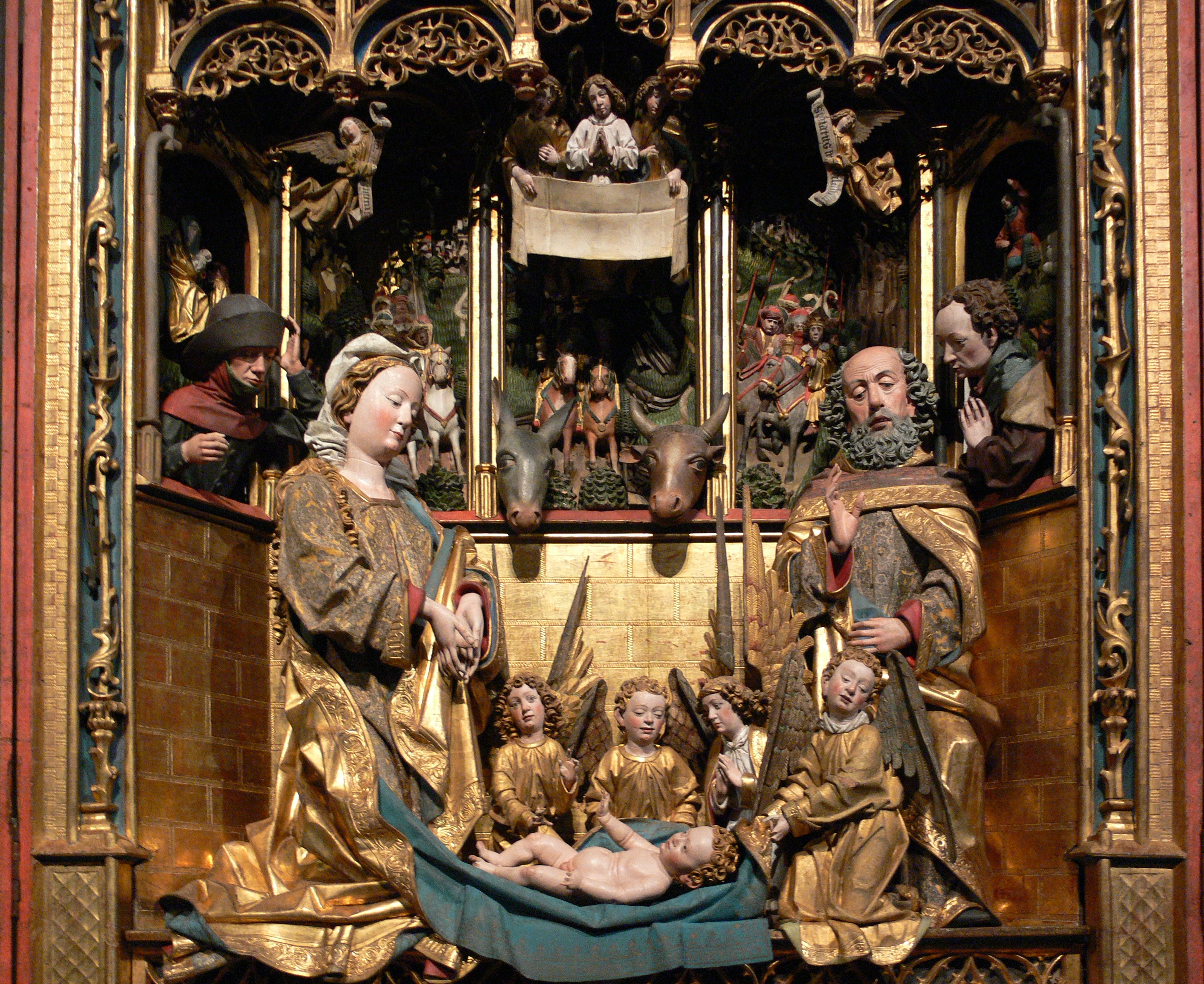 Traminer Altar von Hans Klocker und Werkstatt, Brixen, ca. 1485/1490 Zirbel- und Fichtenholz, originale Fassung, umfassend restauriert 2003-2008 Bayerisches Nationalmuseum, Inv. MA 1952 (bis 1845 Pfarrkirche Tramin; 1856/1857 aus der Sammlung Max Ainmiller erworben) Anbetung der Hirten